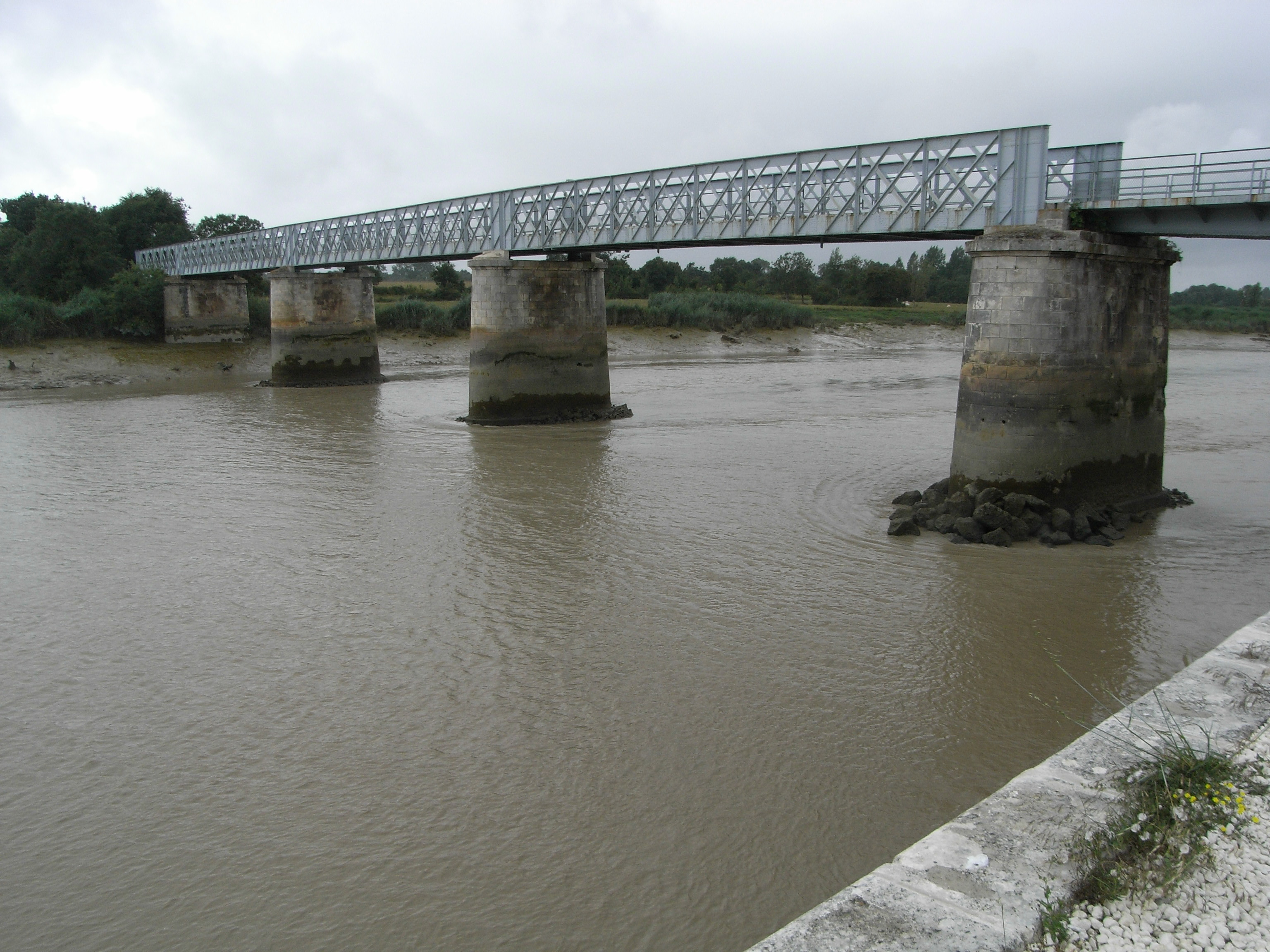 Pont de la Cèpe sur la Charente, c'est une ancienne voie ferrée (de Cabariot à Saint Agnant en Charente-Maritime) qui a été transformée en piste cyclable et piétonnière.